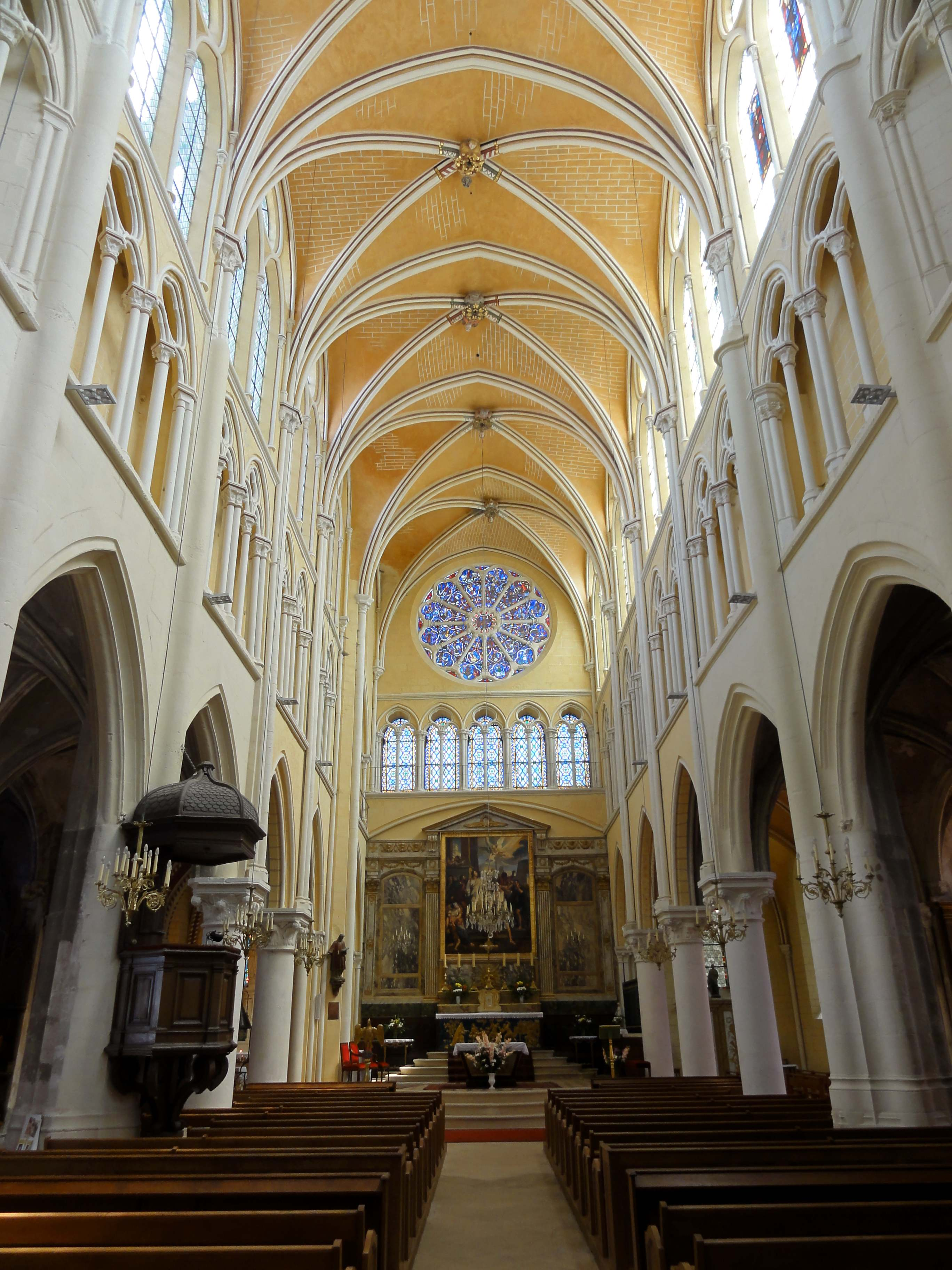 Voir titre.